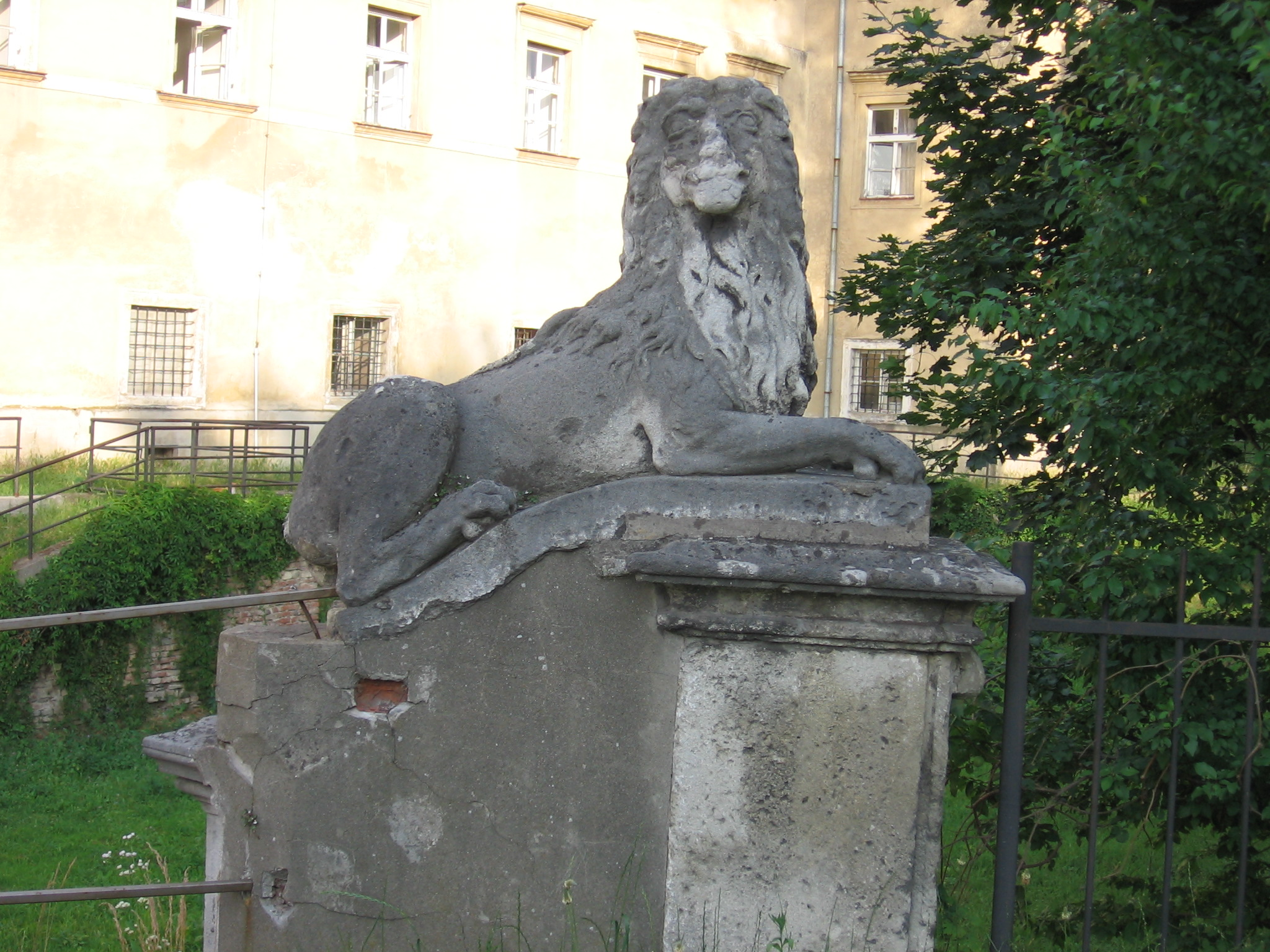 Kategória:Obrázky sôch Kategória:Presunúť na Commons